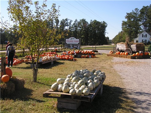 Vollmer farm.